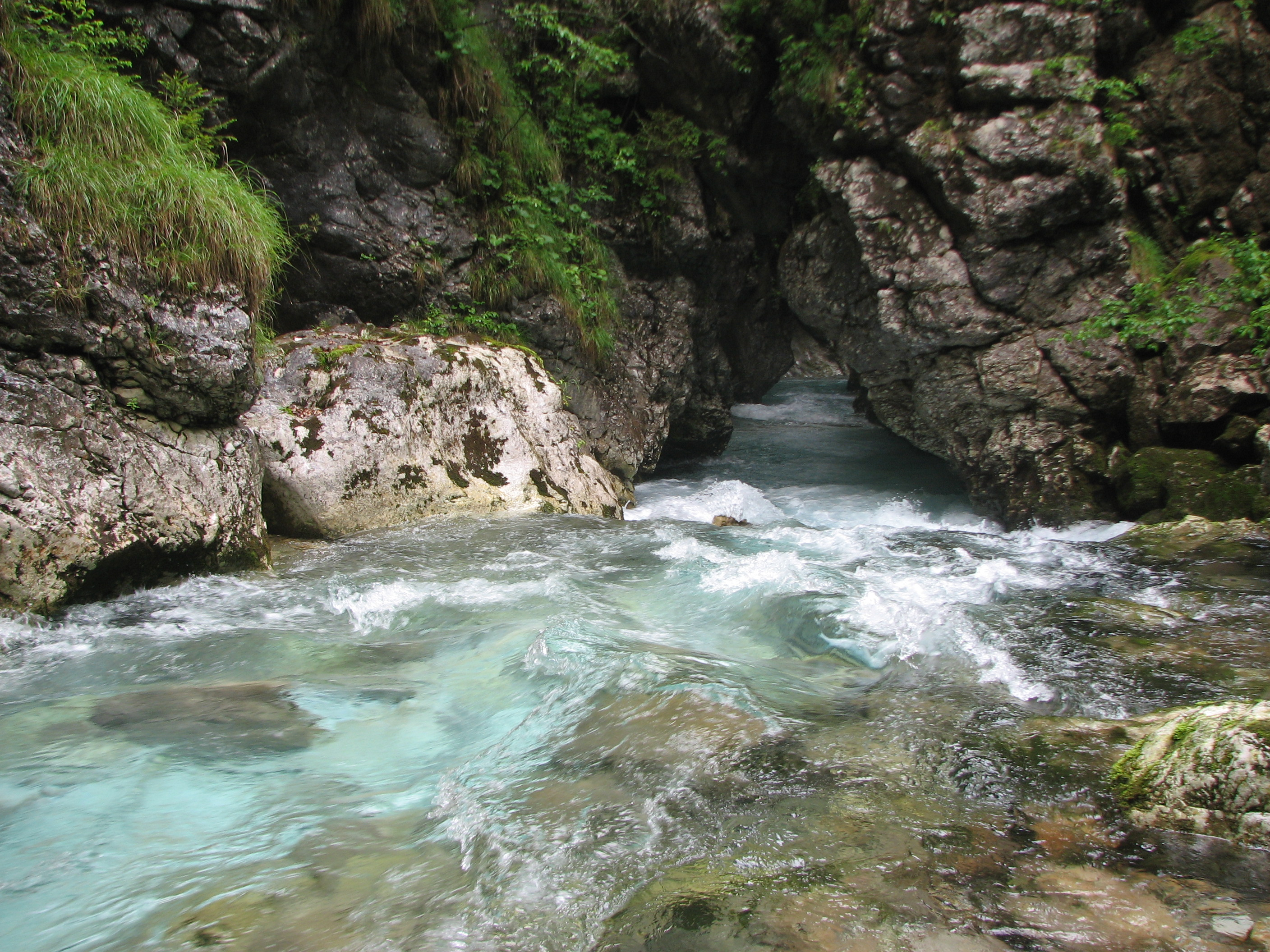 Soteska v Kamniški Bistrici